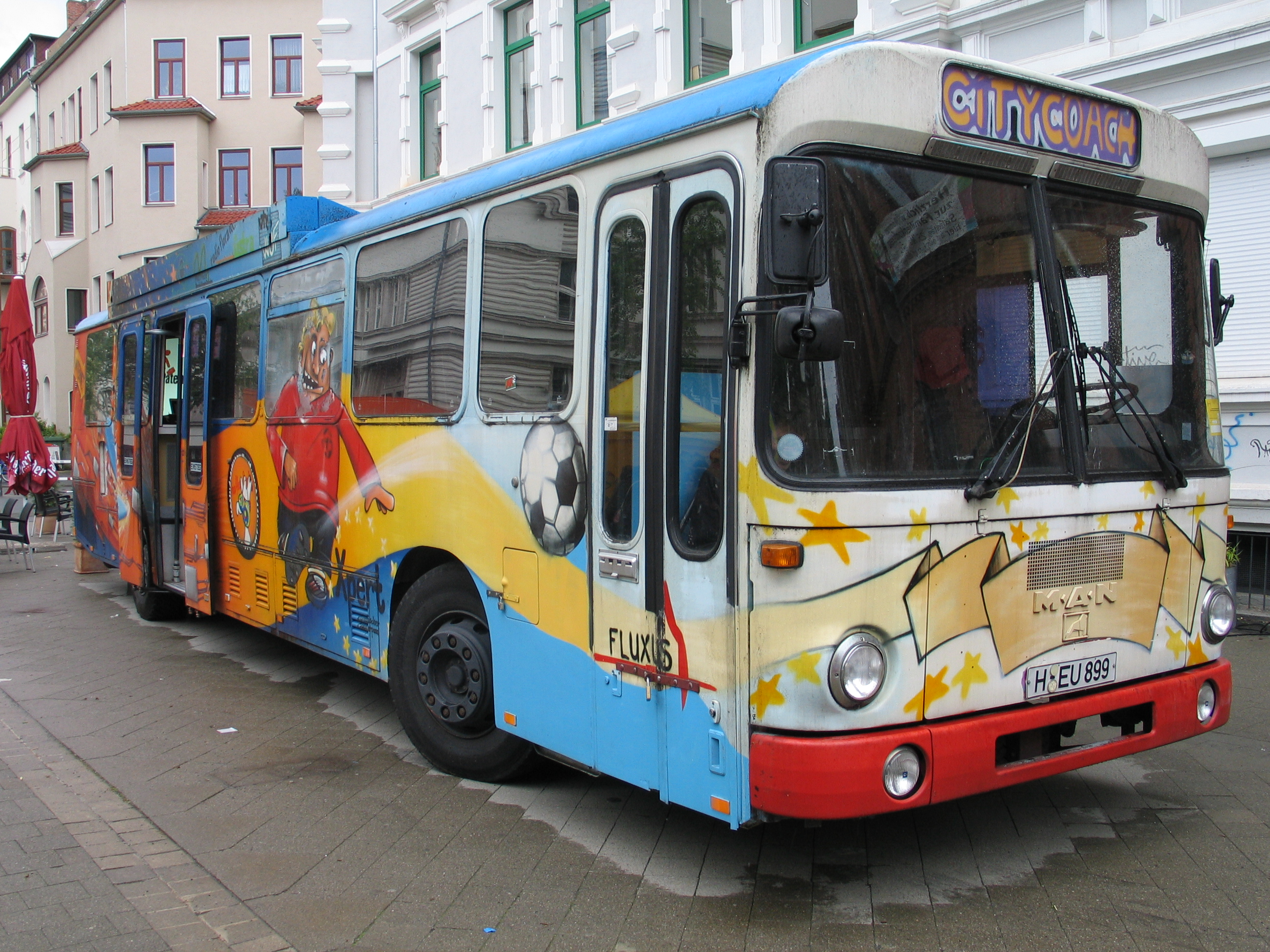 Den mit professionellem Graffitti verzierten Medienbus der Landeshauptstadt Hannover hatten die Mitglieder des Vereins Politik zum Anfassen e.V. für die Familienkonferenz entliehen ...